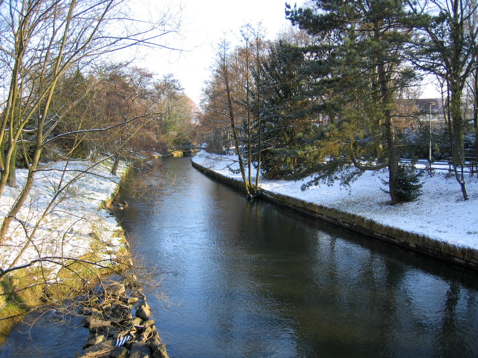 Fluss Hönne in Menden (Sauerland), Obere Promenade (flussaufwärts)